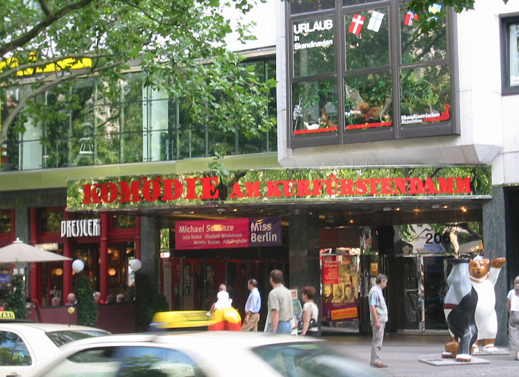 Berlin-Charlottenburg: Komödie am Kurfürstendamm (theatre)